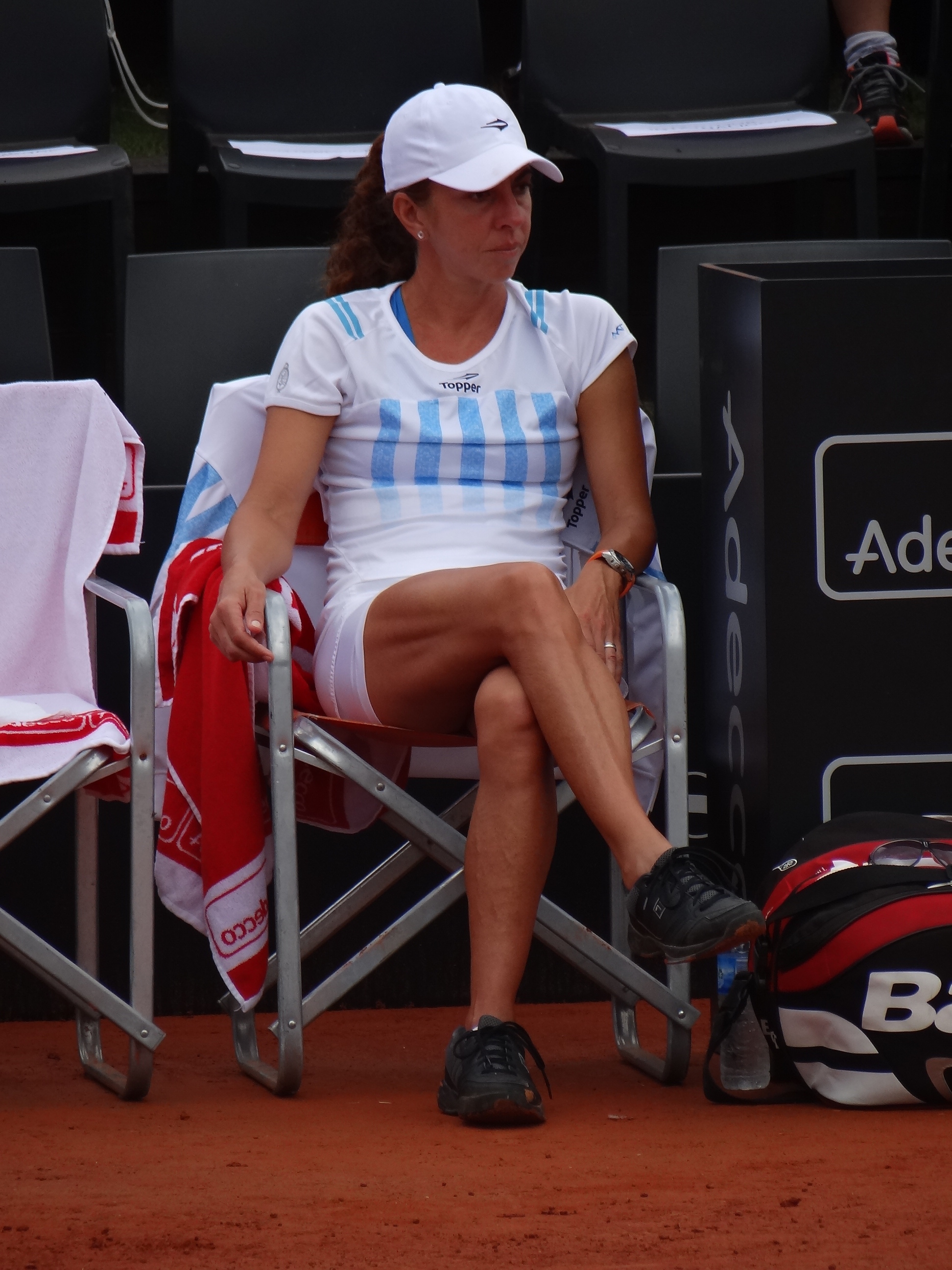 María José Gaidano en su debut como capitana de Fed Cup